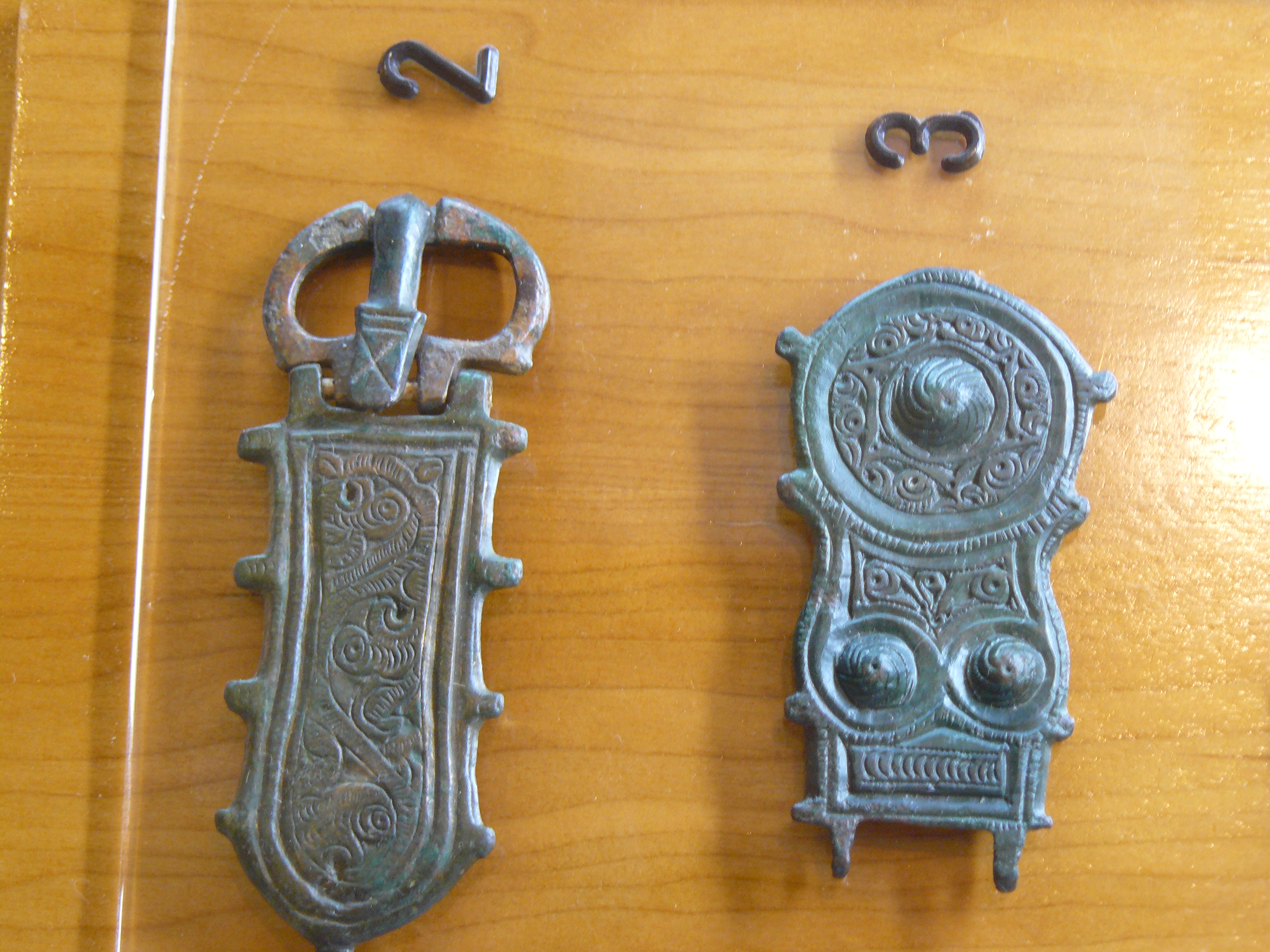 Casa de los deanes, museo provincial de Ávila, Ávila.